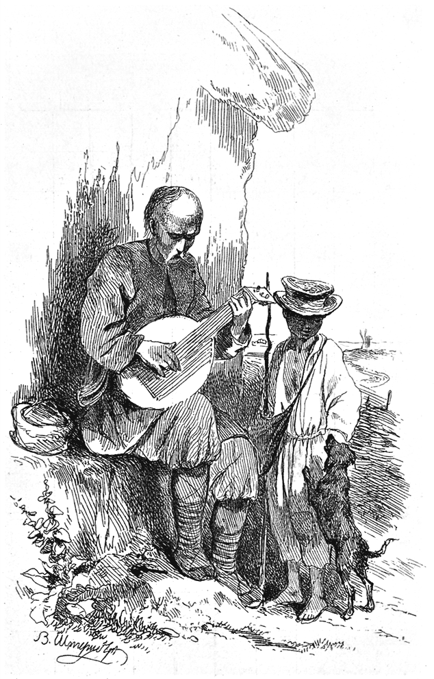 Малюнок Василя Штернберга з першого видання Кобзаря